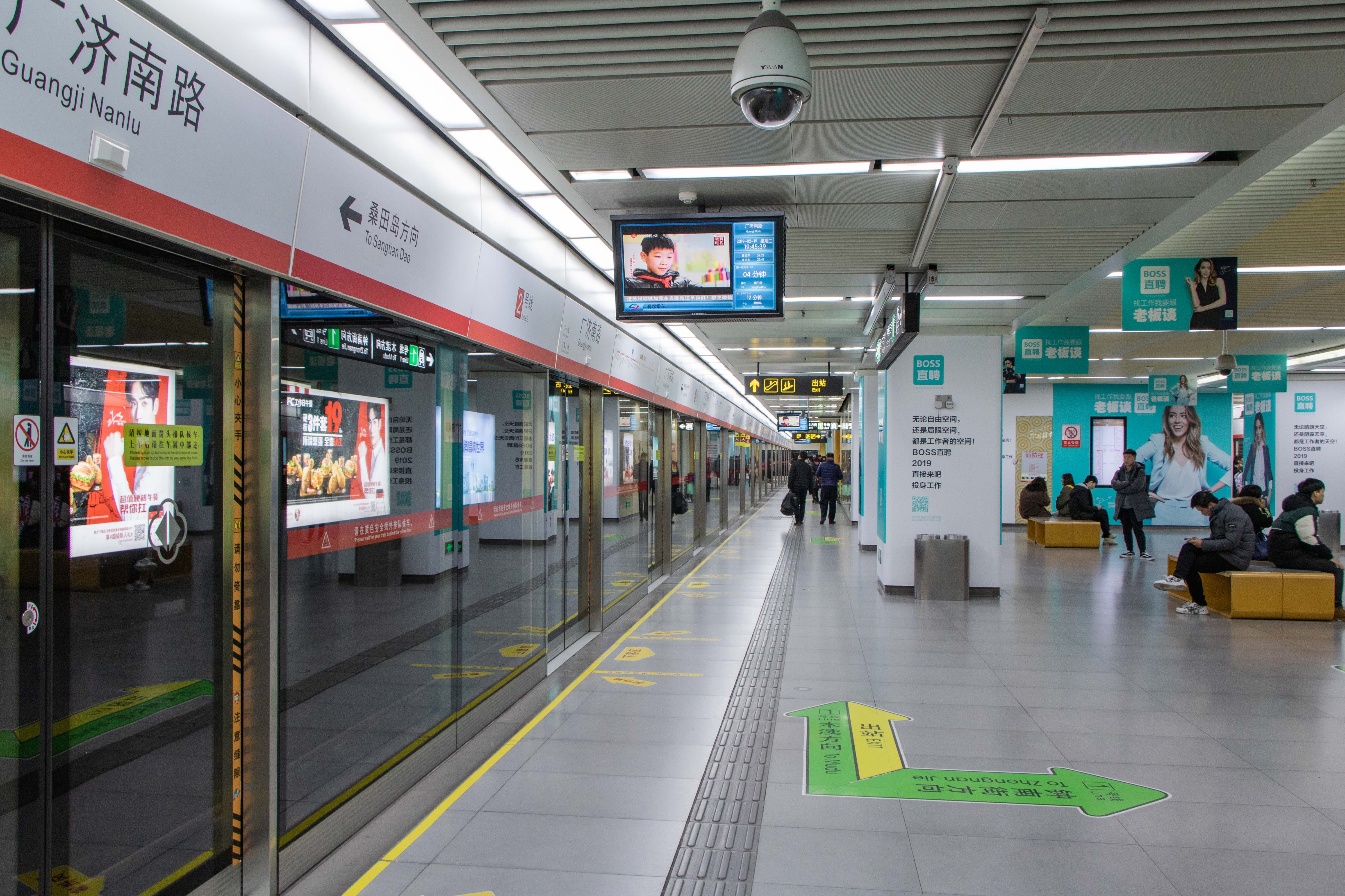 中文（中国大陆）: 广济南路站往桑田岛方向站台